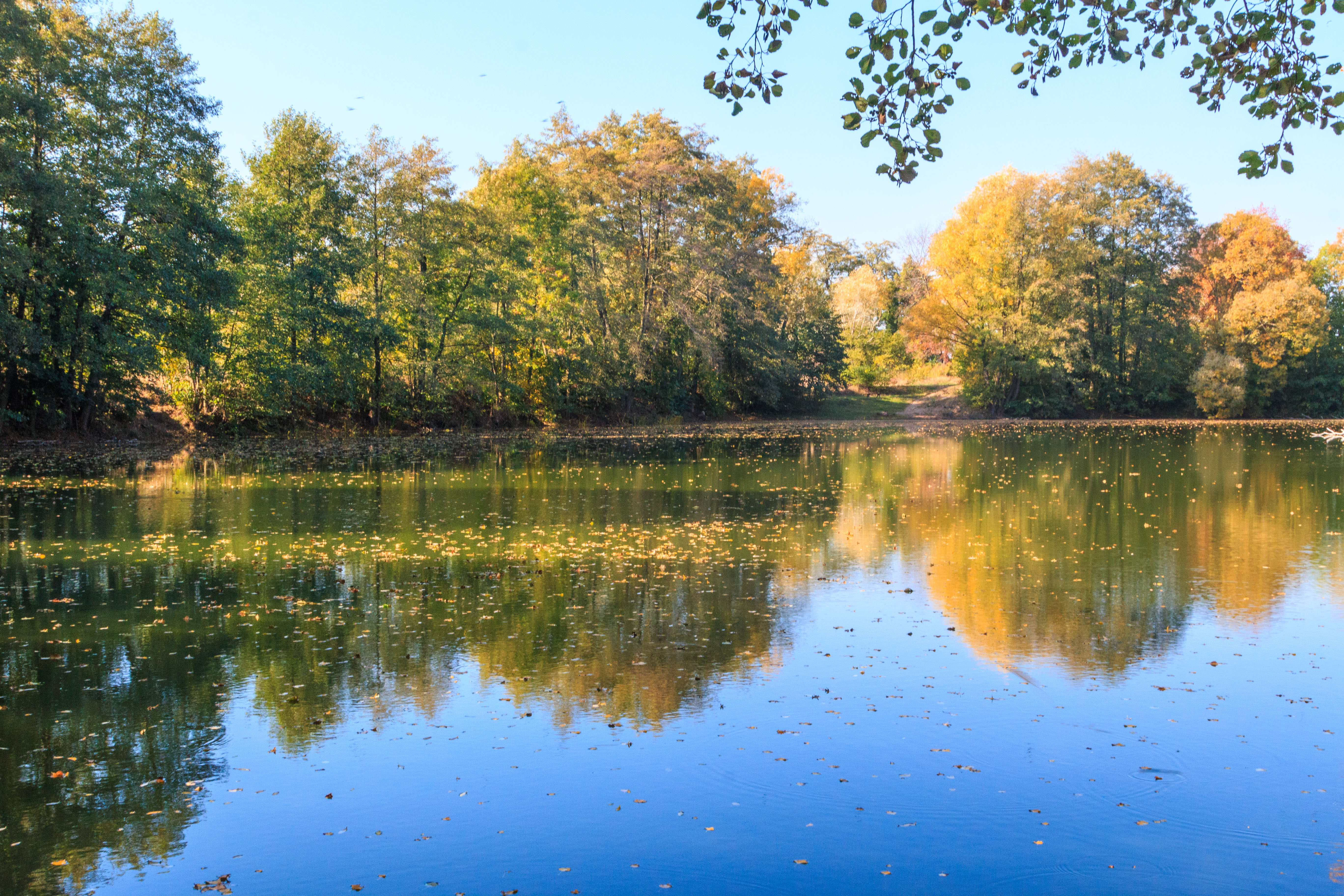 Písník Keprťák Project: Vodstvo.